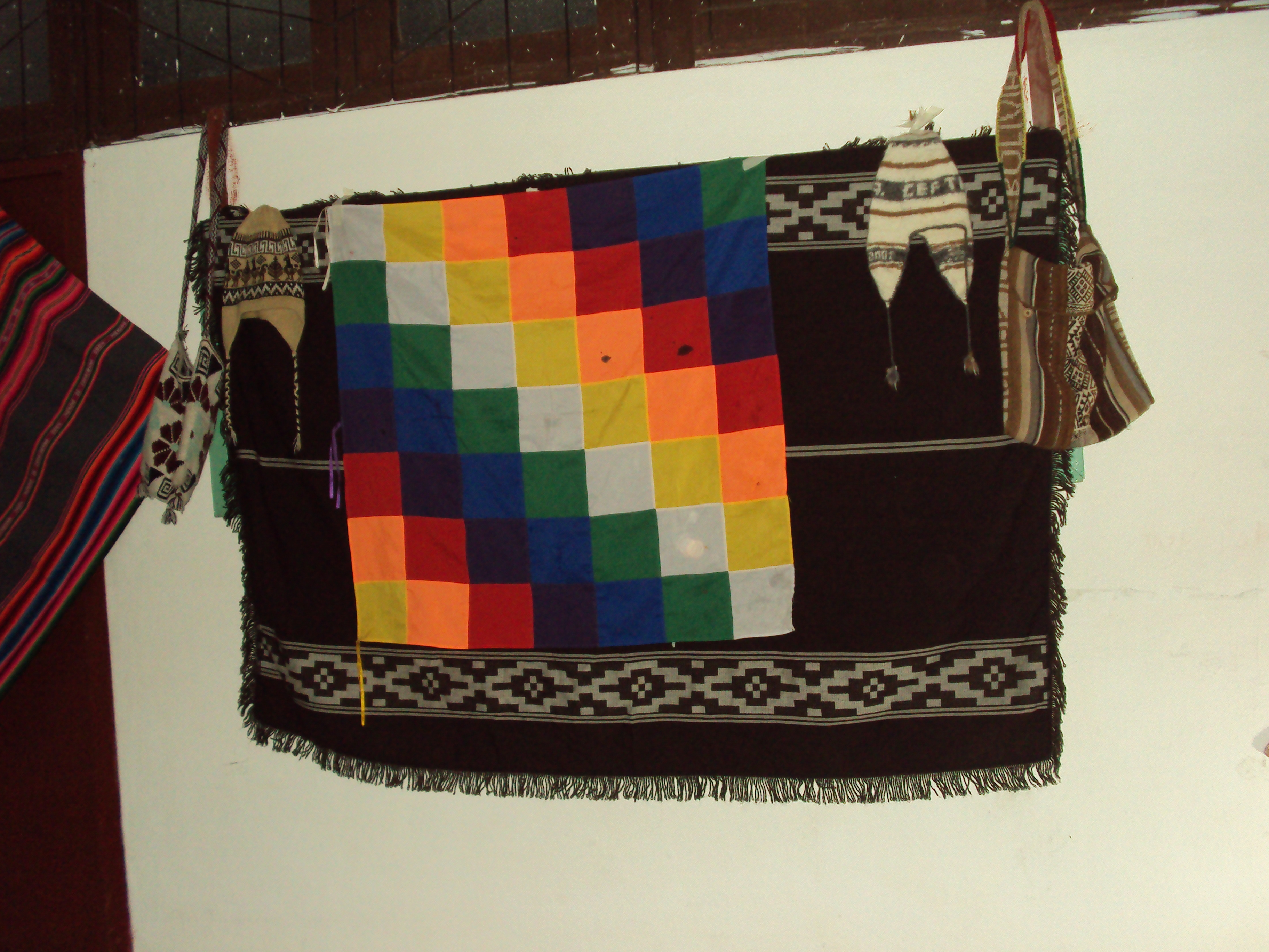 Resistir y florecer nuevamente, nos hace falta. Busquemos el sol, en nosotros mismos.